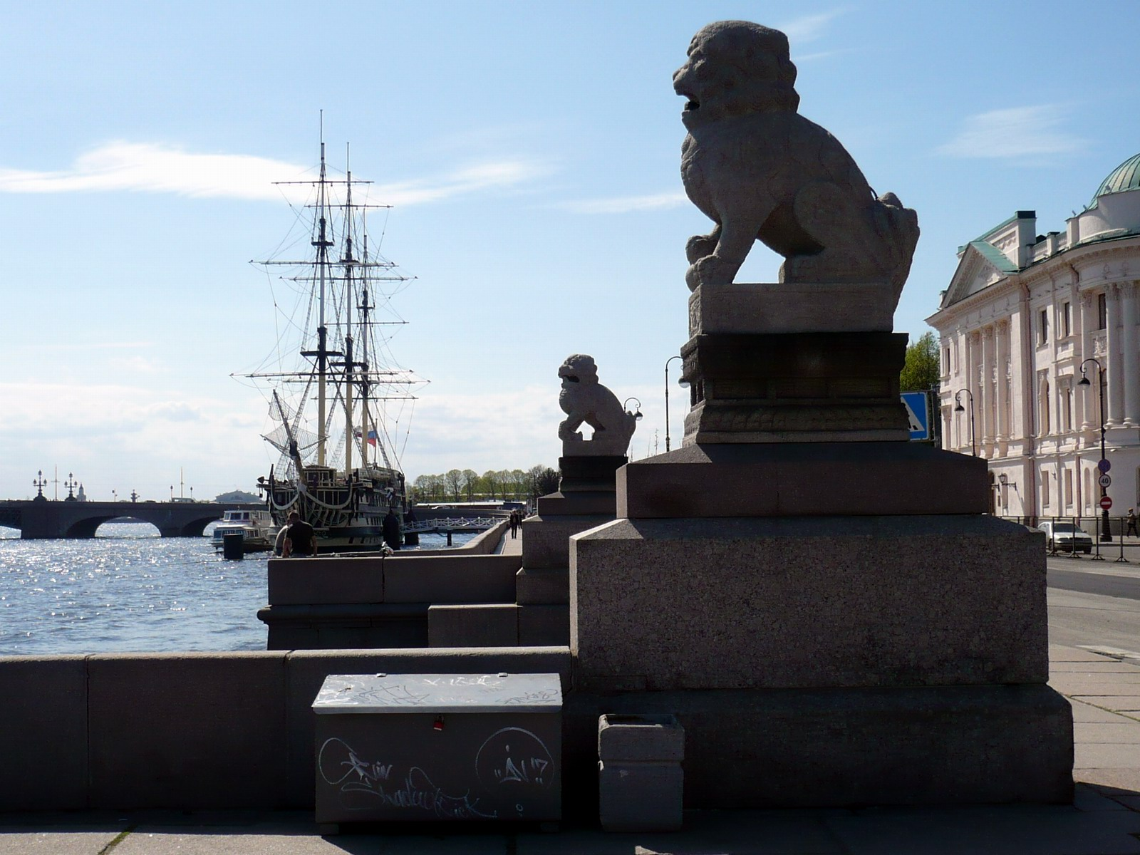 Китайские львы Санкт - Петербург